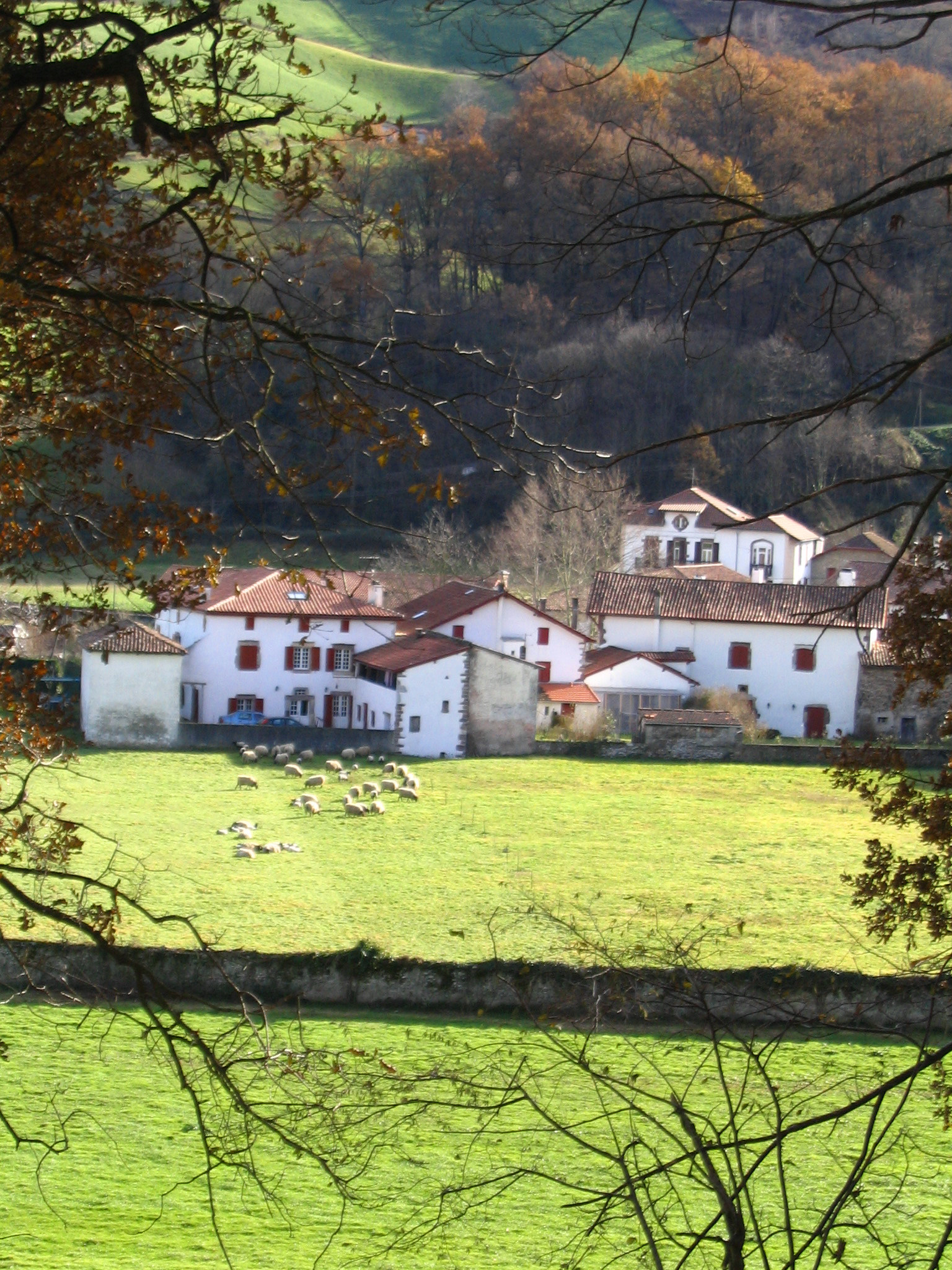 Saint-Etienne-de-Baïgorry - Pays Basque - Pyrénées Atlantiques - France Auteur/author: P.Charpiat 2006